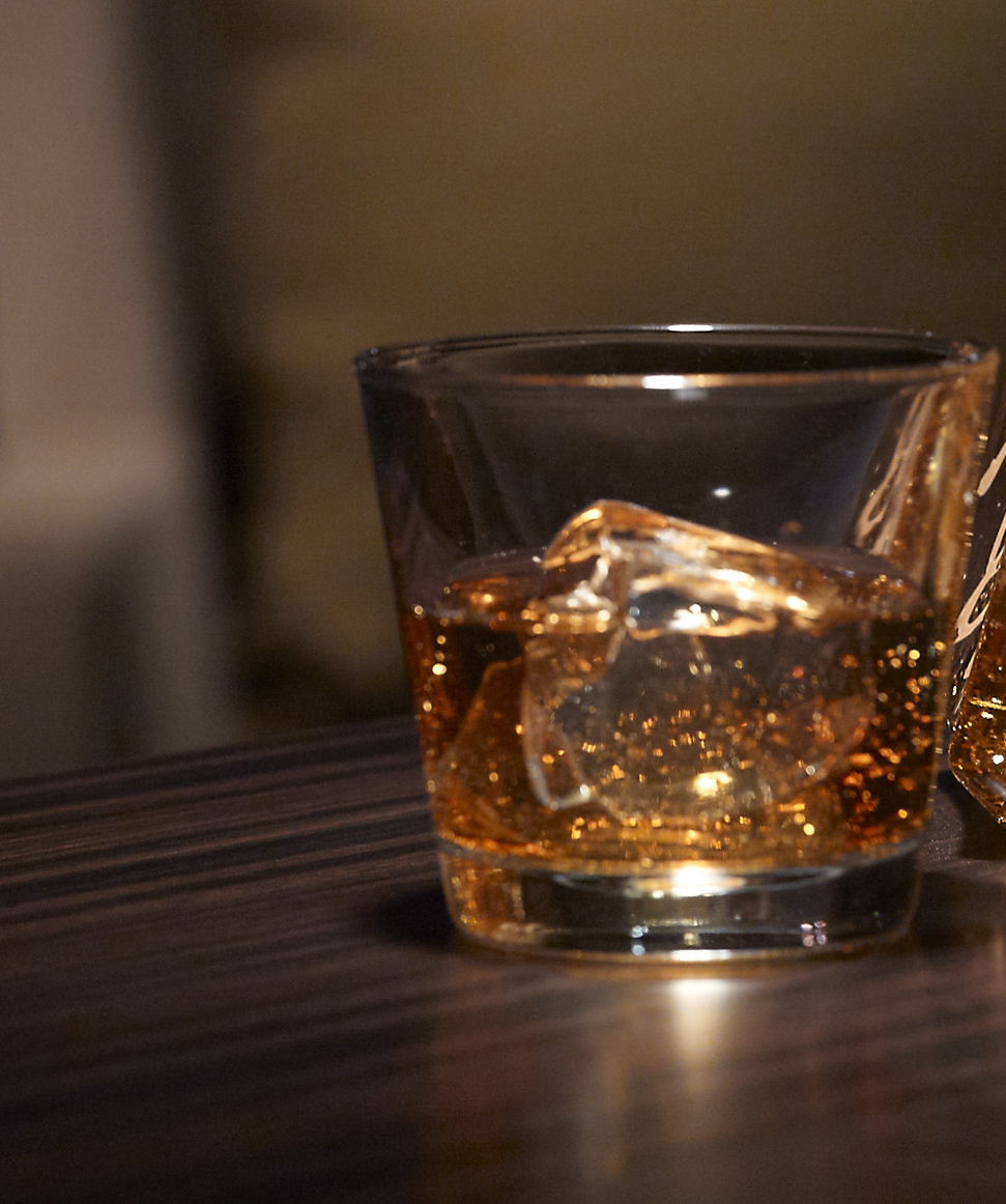 加入金箔的黃金酒